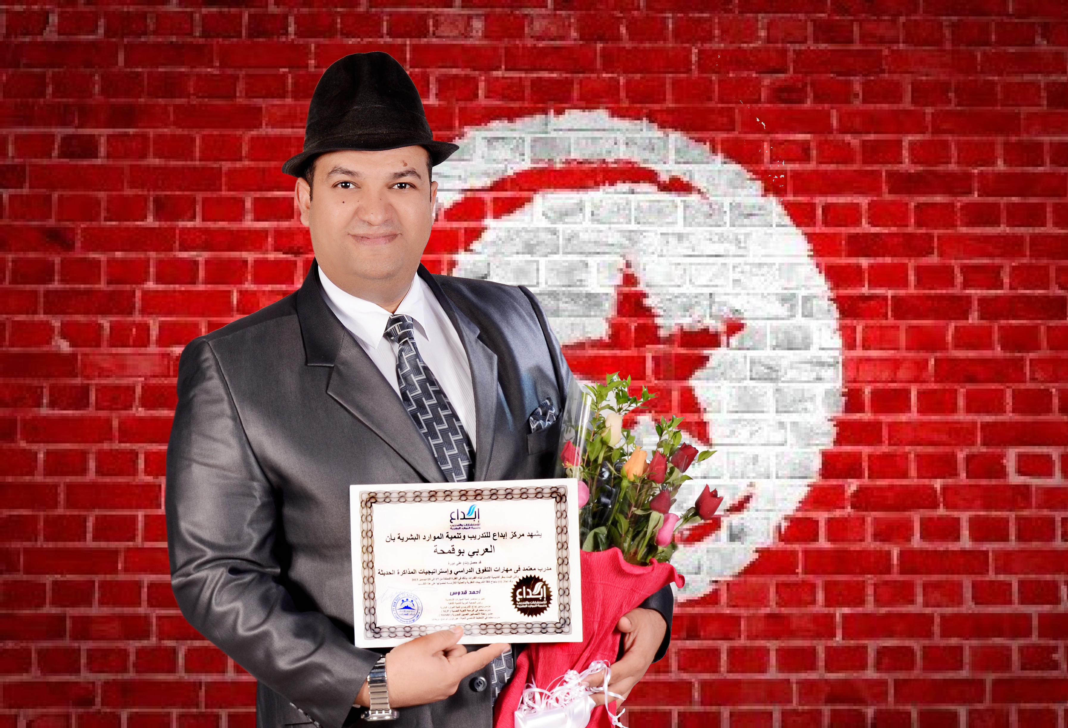 شهادة مدرب معتمد في مهارات التفوق الدراسي واستراتيجيات الامذاكرة الحديثة